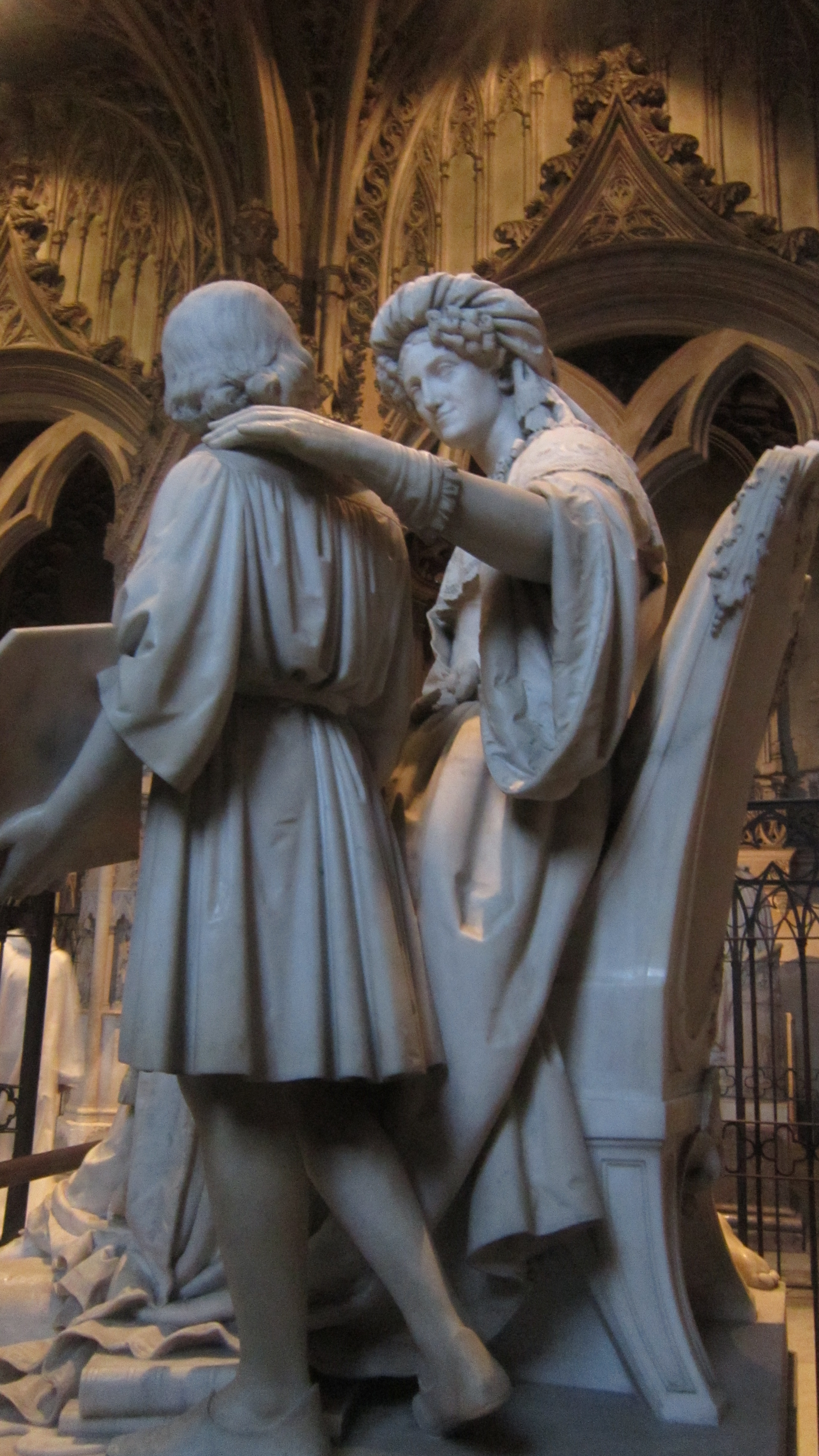 Statue de Marie-Christine de Bourbon-Siciles, par Giovanni Albertoni